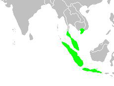 areale della specie